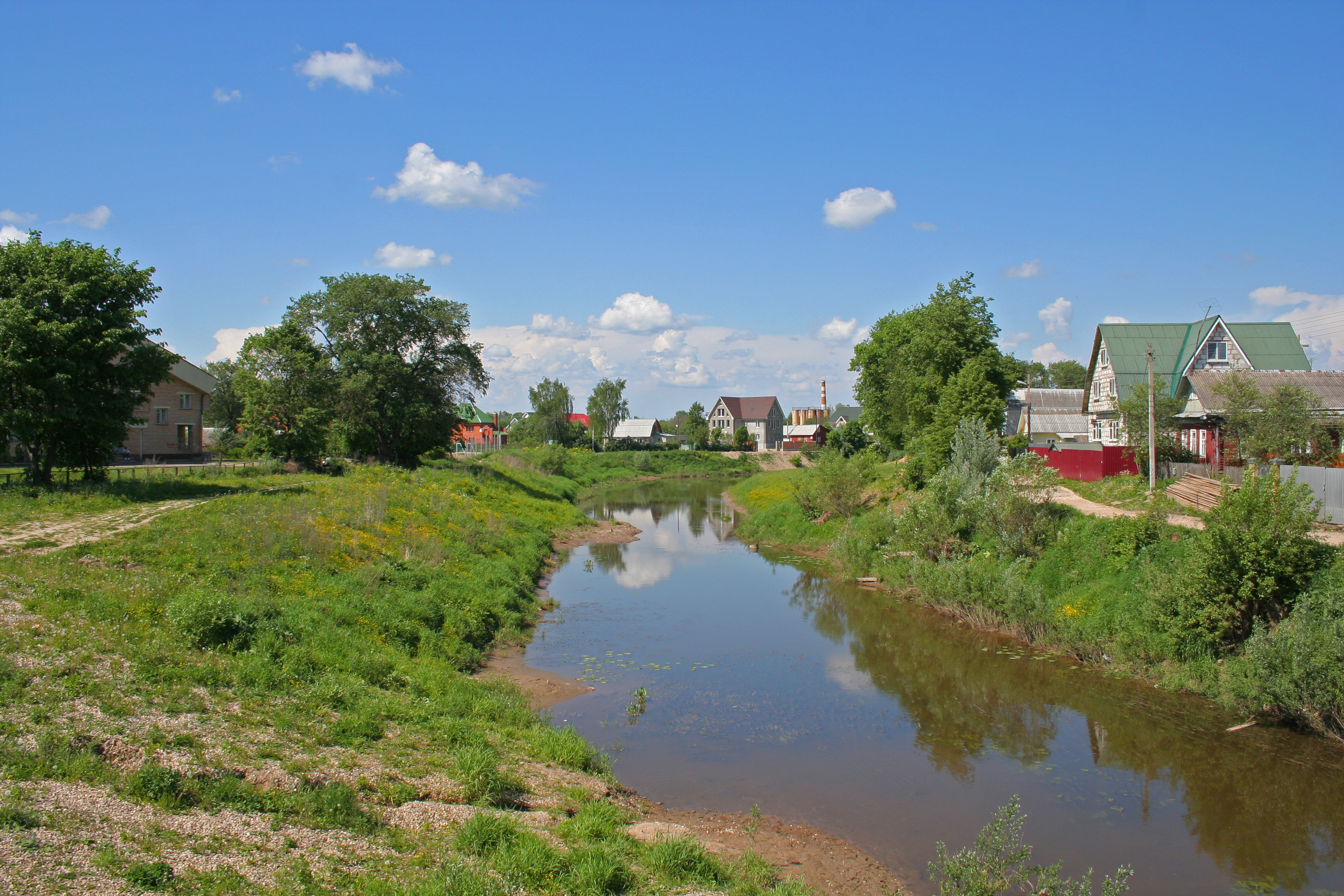 Stadt Gagarin (ehem. Gschatsk), Oblast Smolensk, Russland. Der Fluss Gschat.